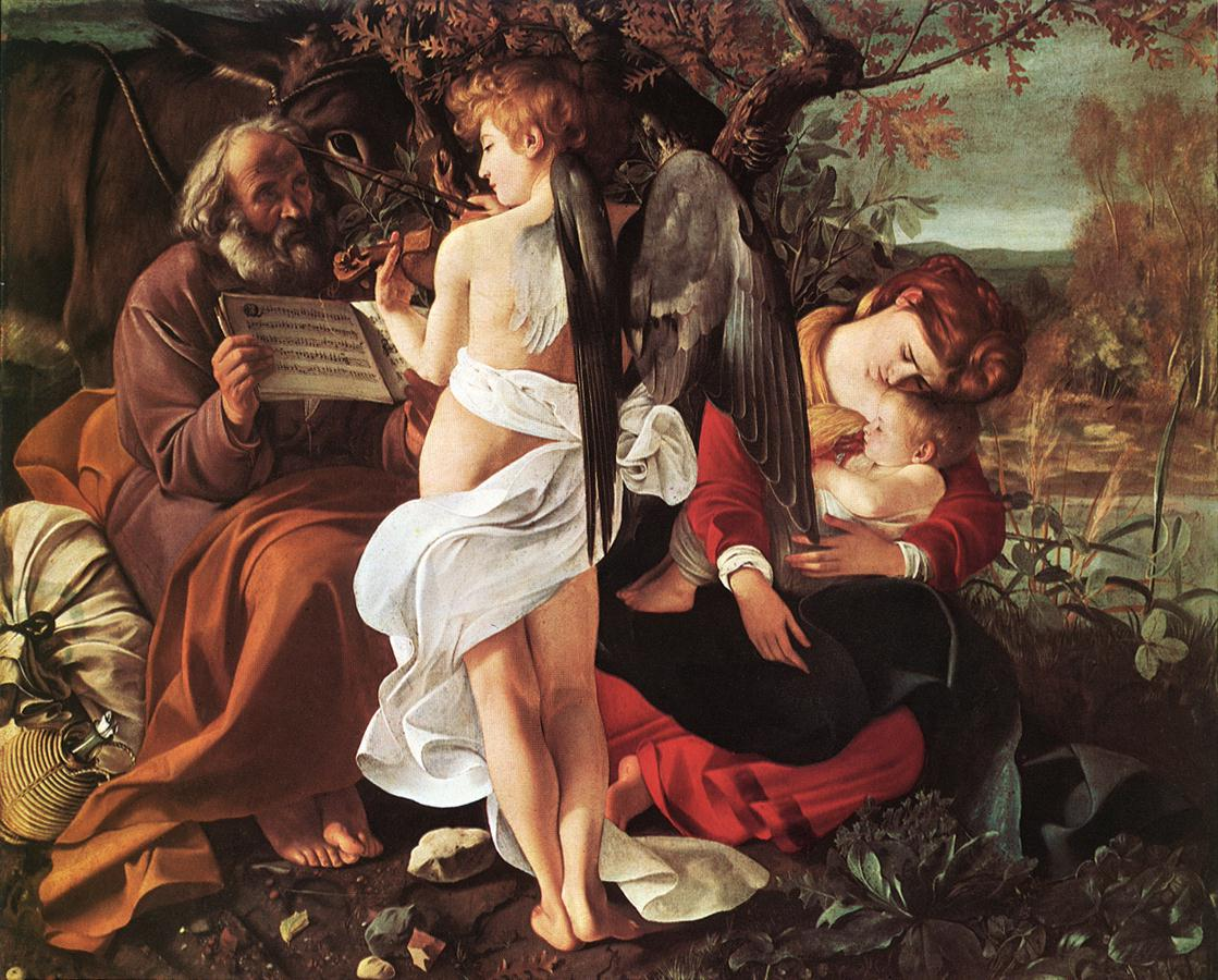 Le Caravage - Le repos pendant la fuite en Égypte (1596 - 1597) - Huile sur toile, 133.5 x 166.5 cm - Galleria Doria-Pamphili, Rome